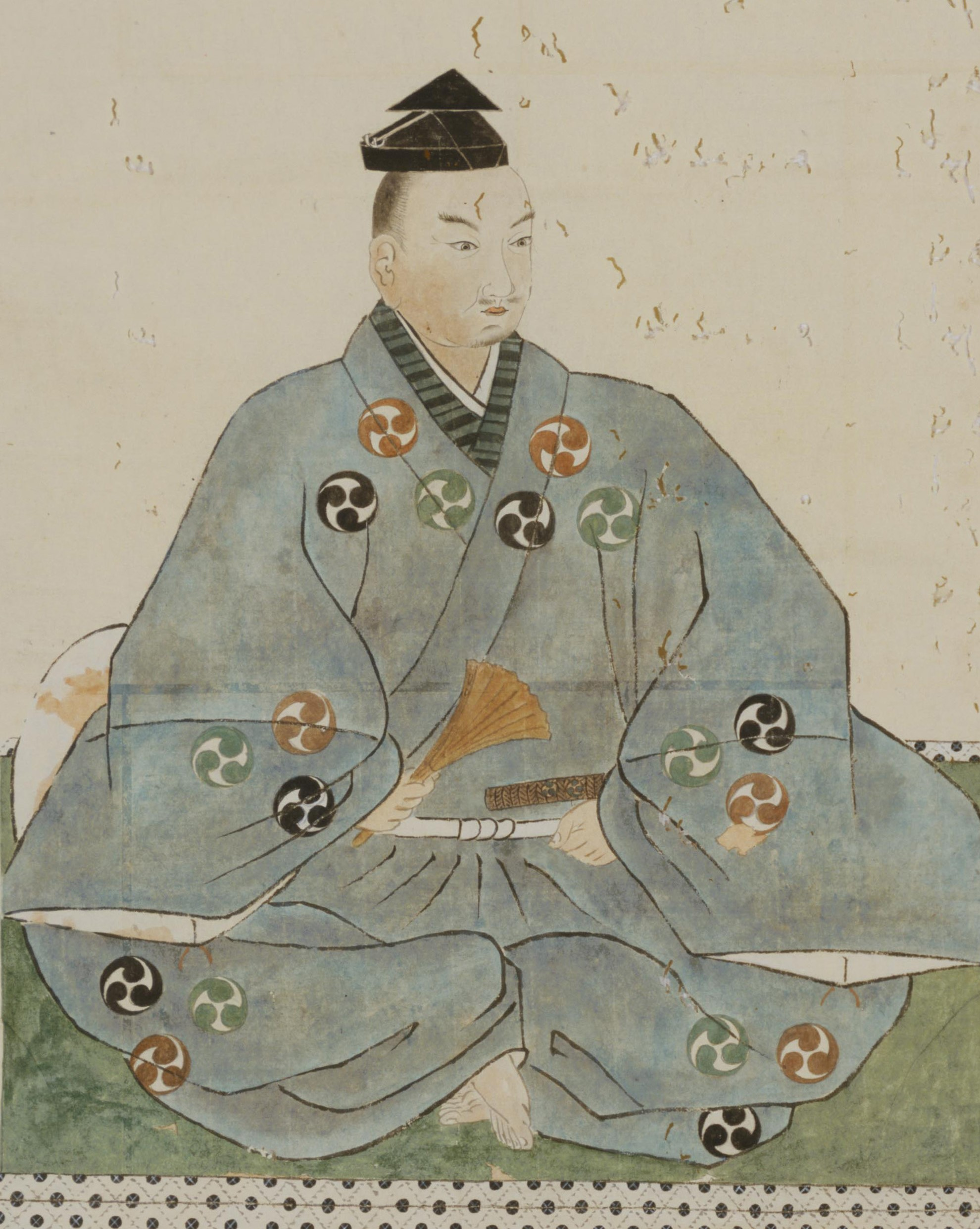 小早川煕平の肖像。